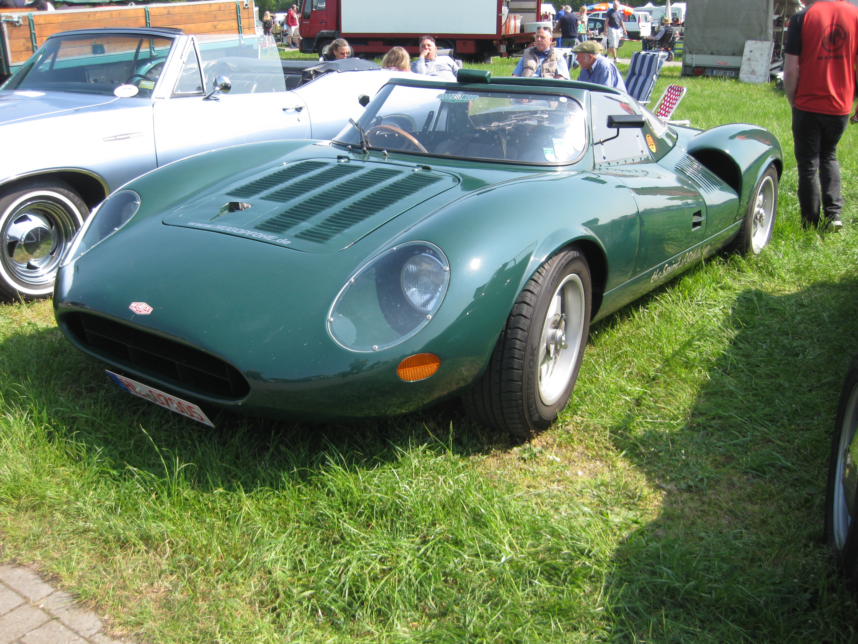 Jaguar XJ 13 Replika